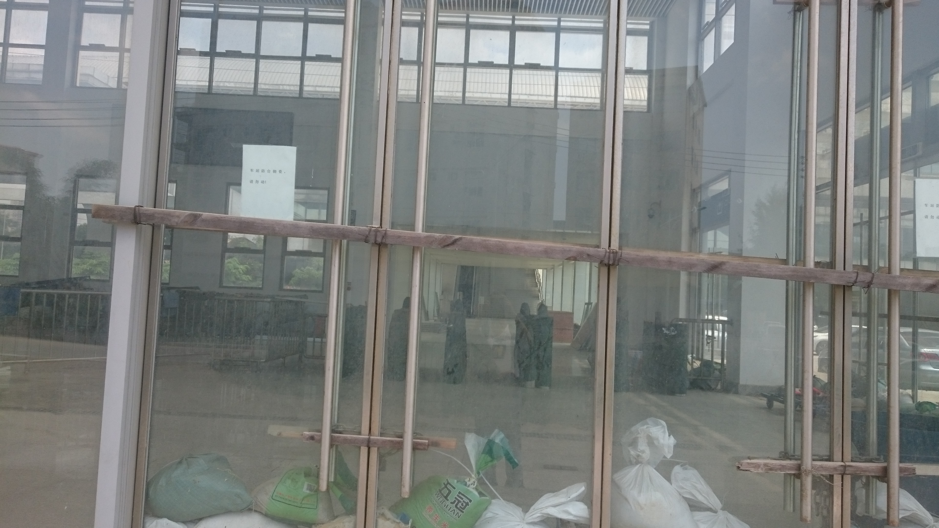 海南東環鉄道(電鉄線)秀英駅入口。閉鎖されている。